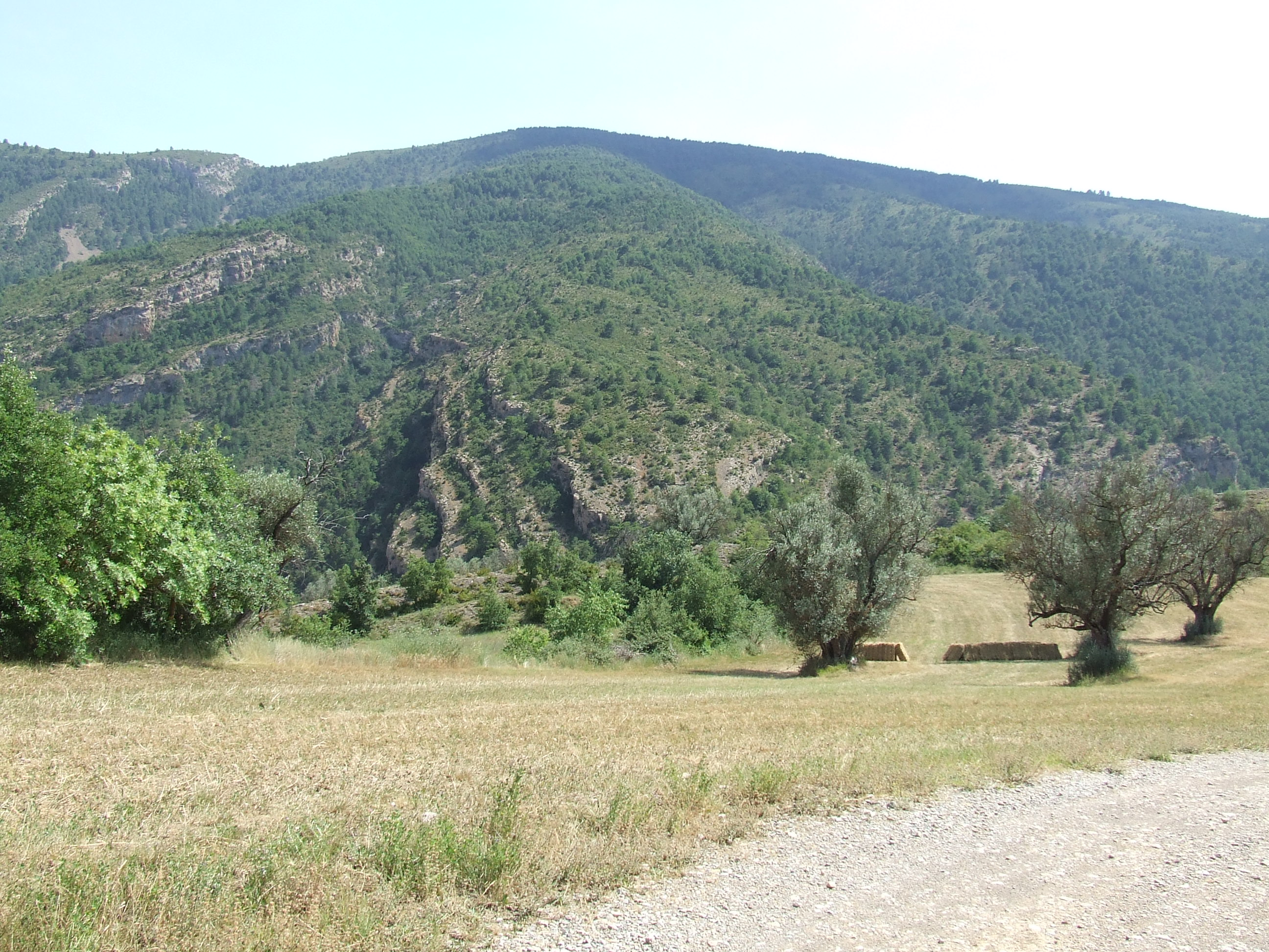 El Serrat Gros d'Aramunt (Conca de Dalt, Pallars Jussà)